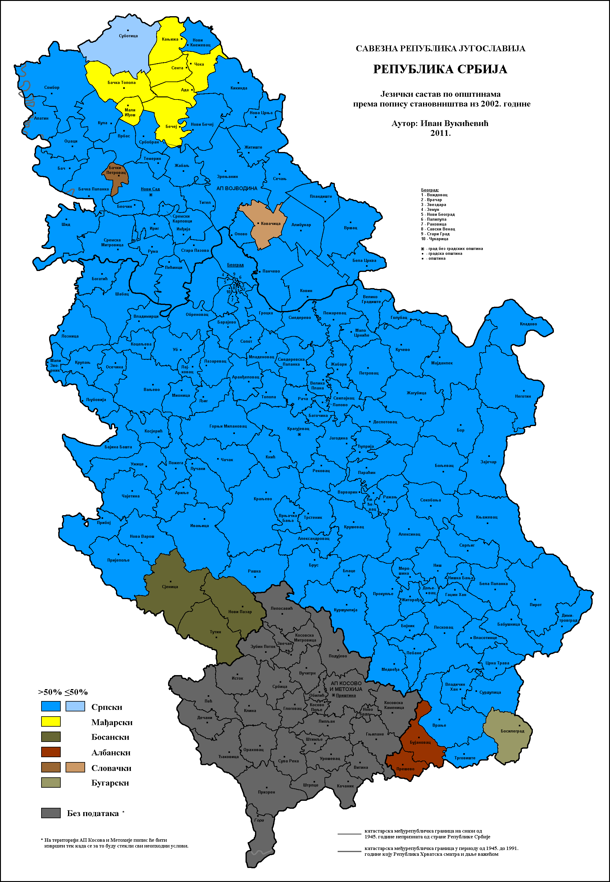 Језички састав Србије по општинама 2002.